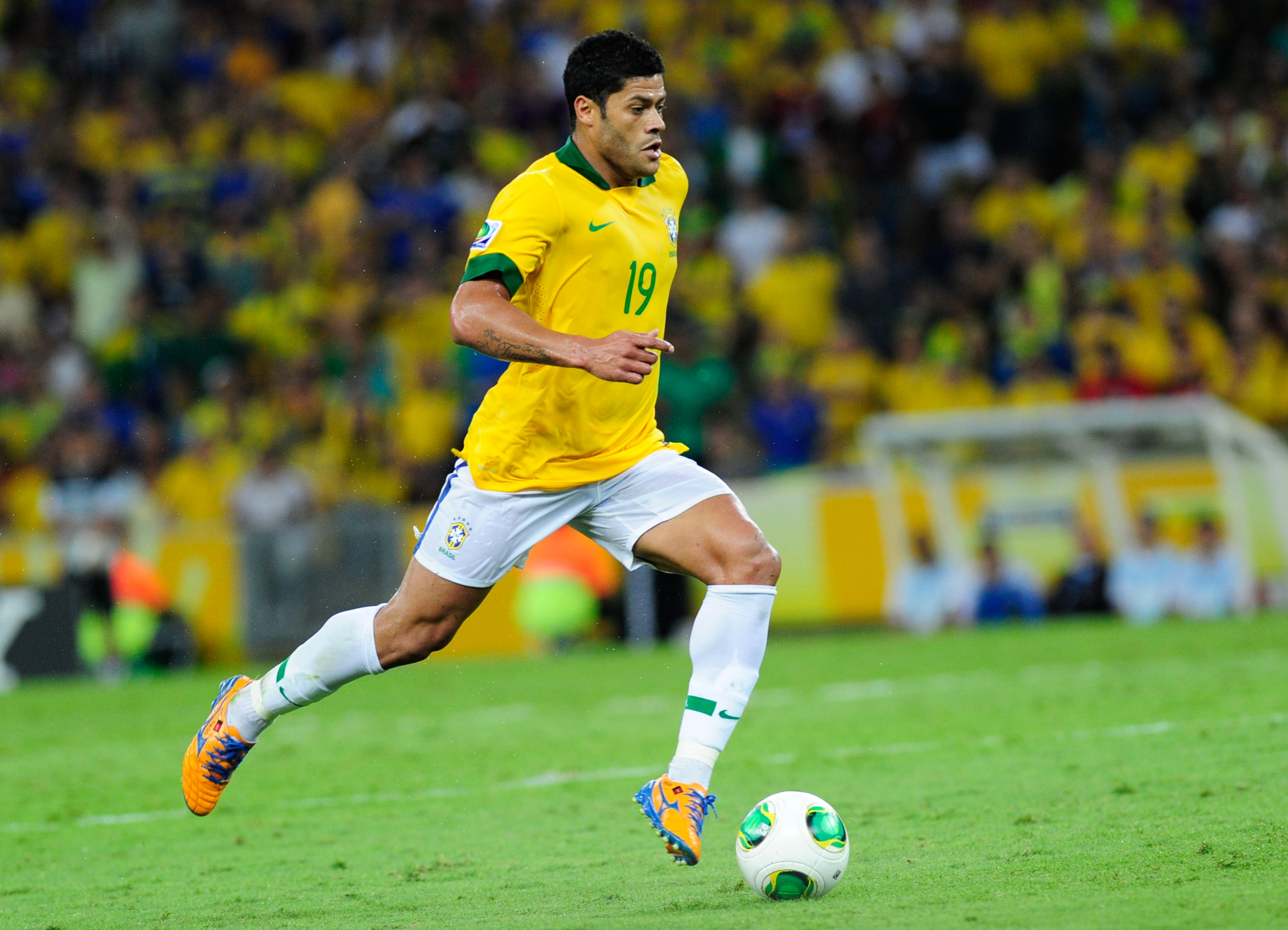 No Estádio do Maracanã, Brasil e Espanha disputam a taça da Copa das Confederações de 2013.